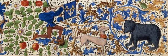 Ours dans l'encadrement, Jean Froissart, Chroniques, Bruges, 3e-4e quart du XVe siècle. Conservé à Paris, BNF, département des Manuscrits, Français 2643, fol. 180.